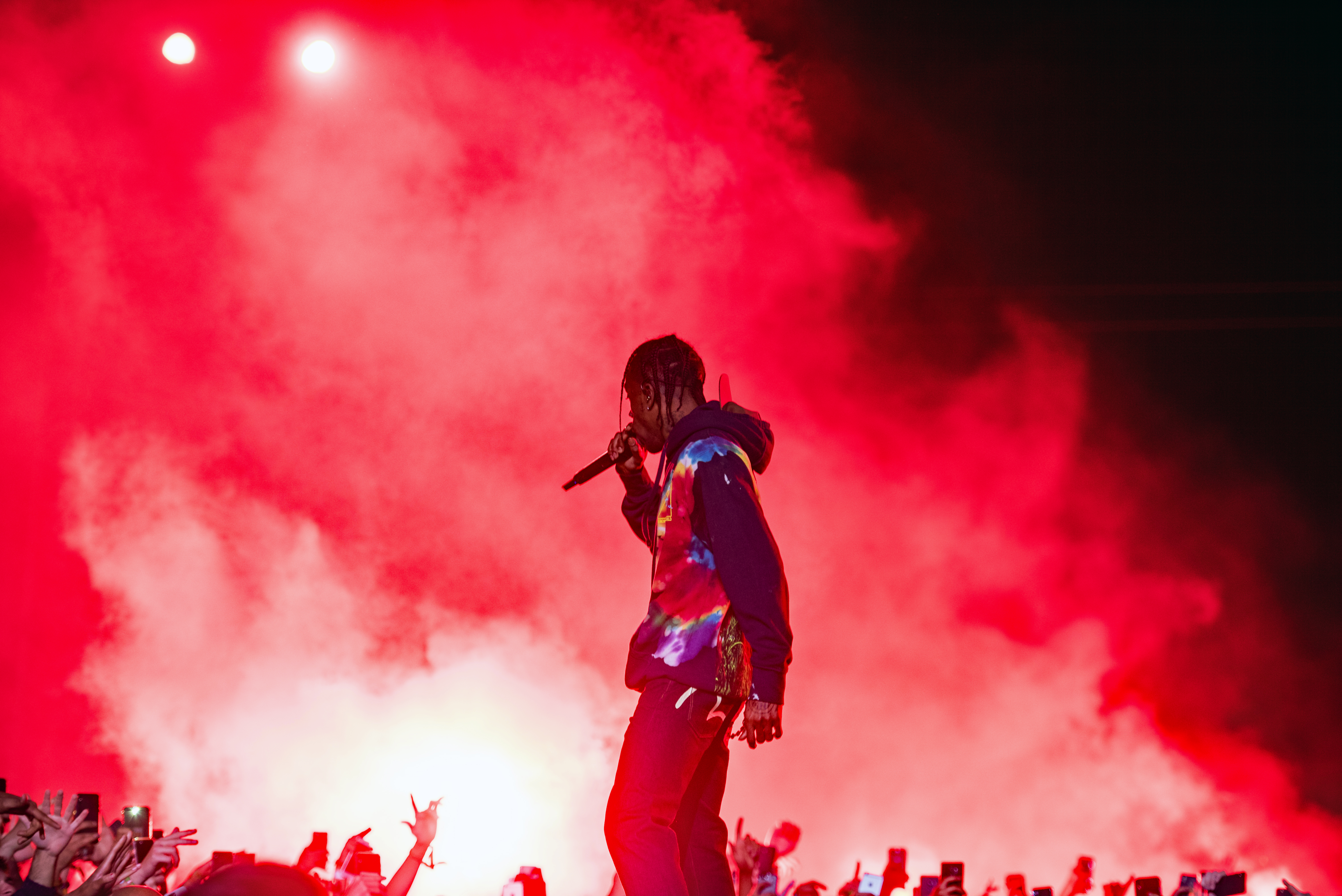 Travis Scott live auf dem Openair Frauenfeld 2019